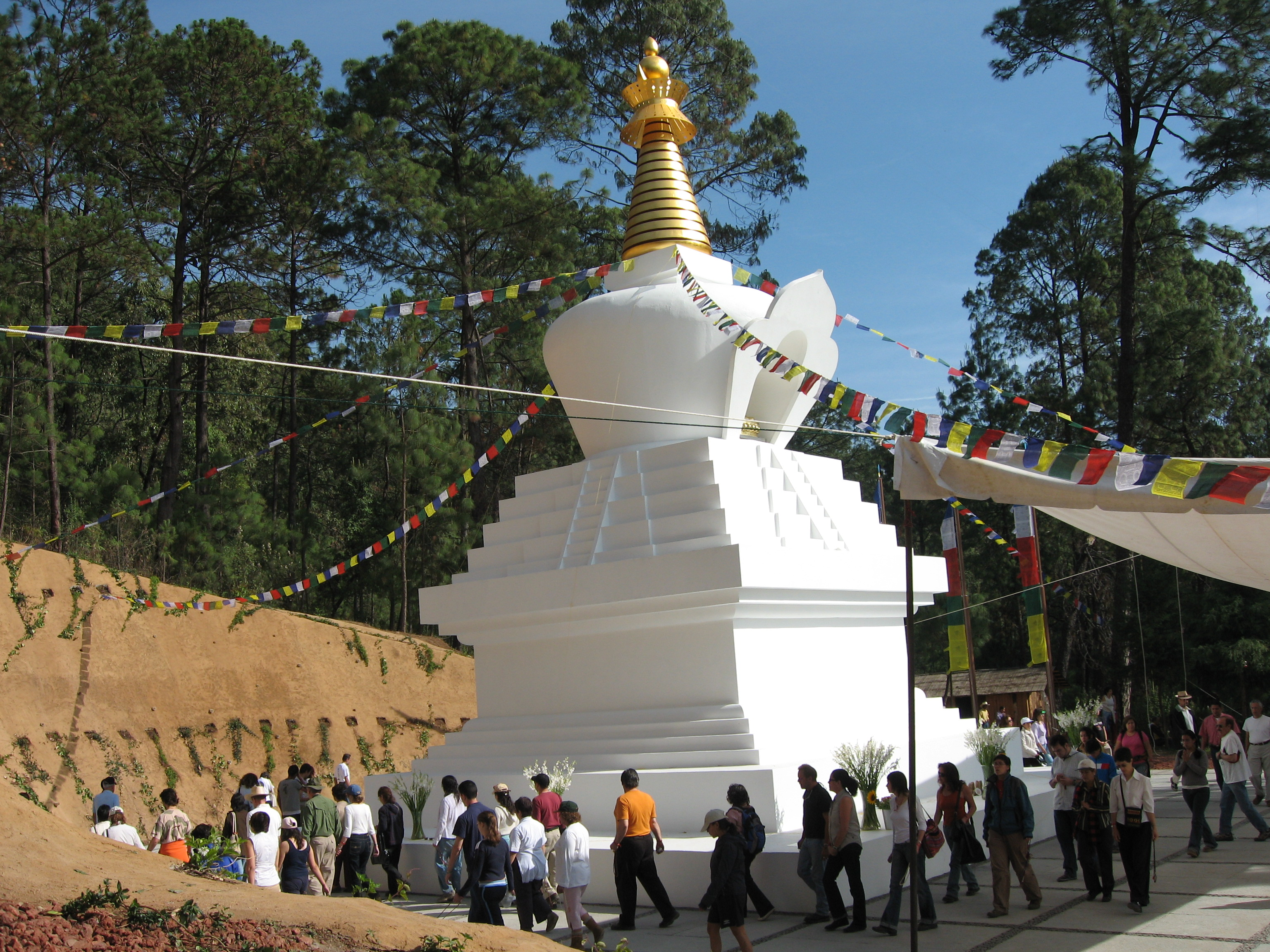 Ceremonia budista marzo 2006 Mexico